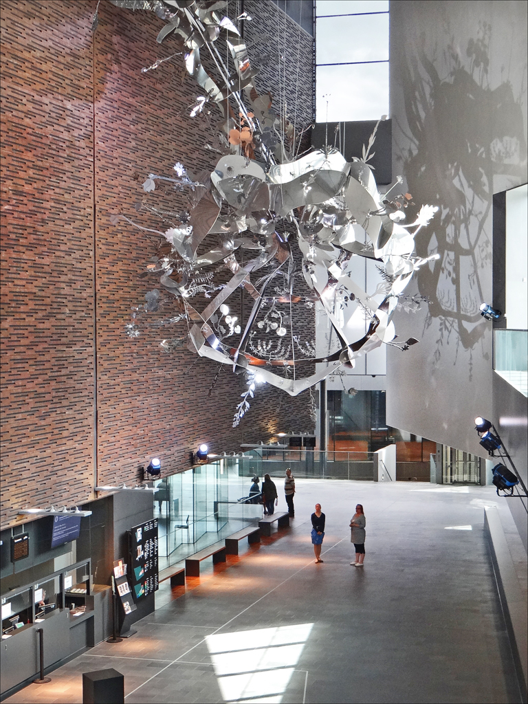 Le grand hall avec la billetterie, les accès aux salles de concert et les services annexes La maison de la musique (Helsinki Music Centre) a été ouverte à l'automne 2011, le bâtiment est l'oeuvre de LPR Architects. Les principaux concepteurs du bâtiment sont les architectes Marko Kivistön, Ola Laiho et Mikko Pulkkinen (acousticien : Yasuhisa Toyota) Article de Wikipedia Site de l'institution